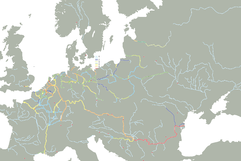 fleuves, rivières, canaux, en Europe